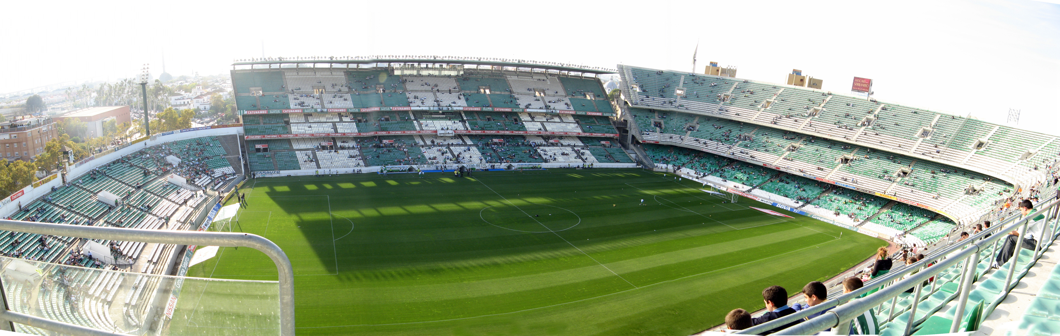 Estadio del Real Betis Balompié una hora antes del partido.